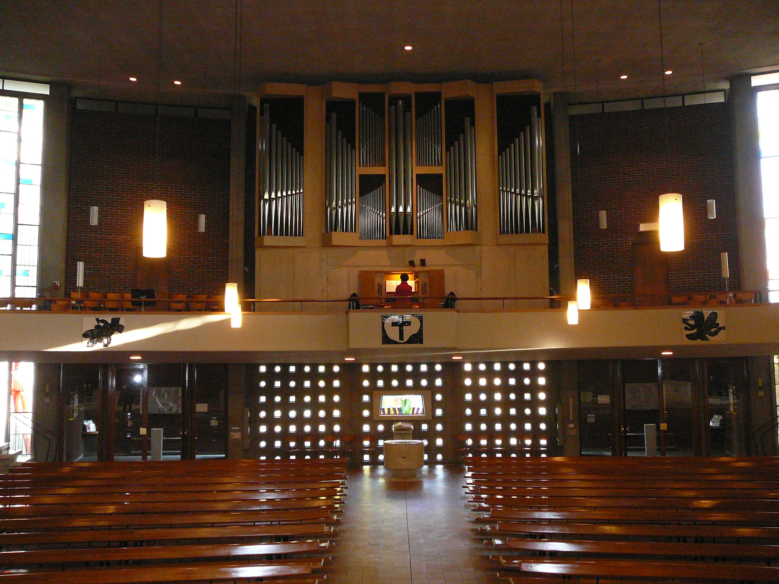 Römisch-katholische Pfarrkirche St. Laurentius Winterthur-Wülflingen, Blick zur Orgelempore